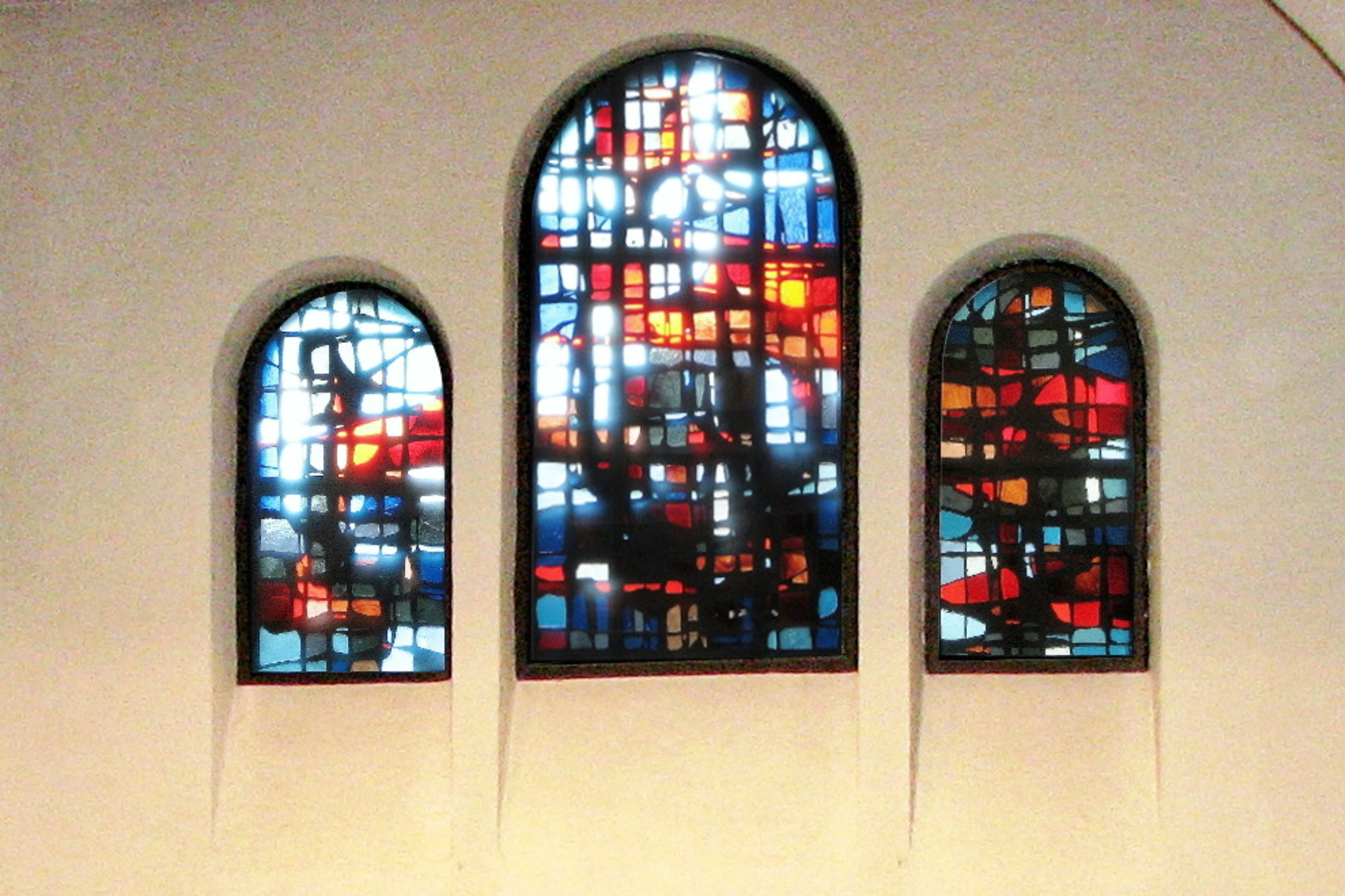 Les vitraux ont été réalisés par le célèbre maître vitrier Louis-René Petit et installés en 1964.